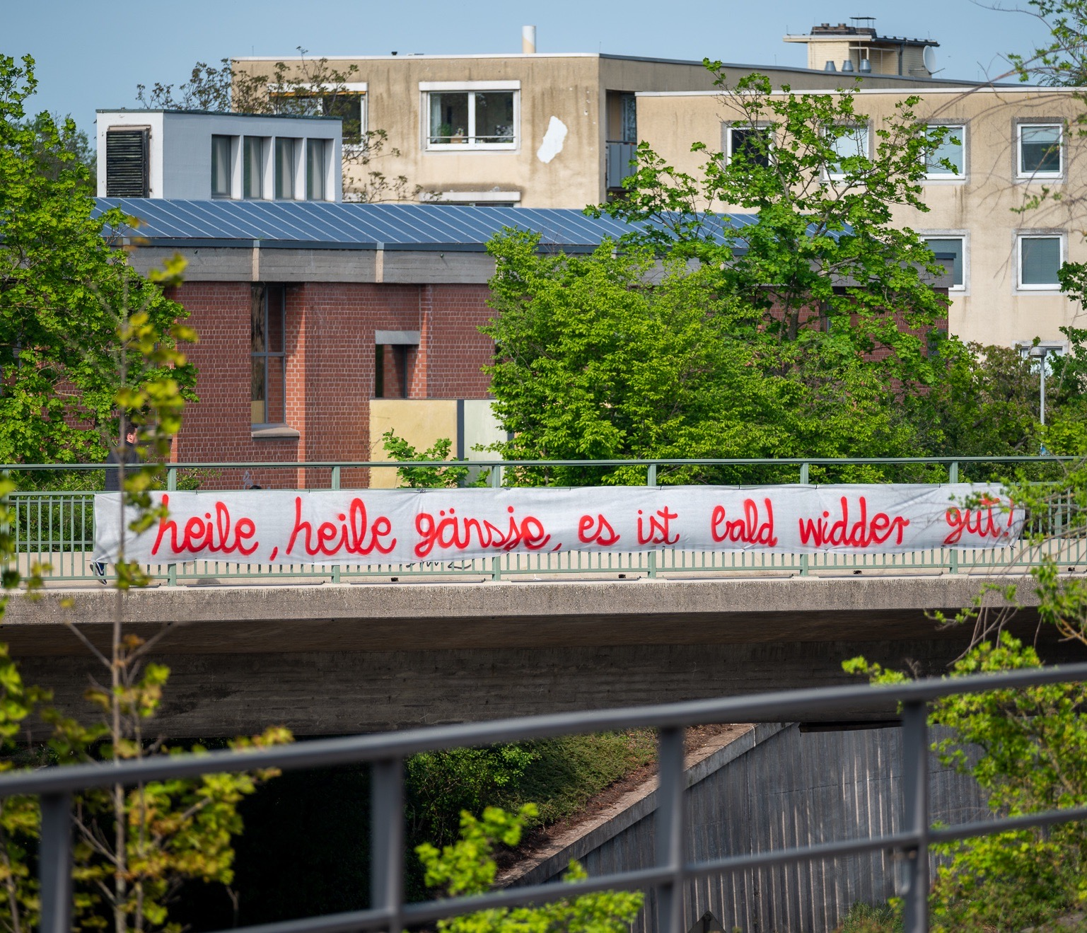 Transparent oberhalb der Saarstraße in Mainz anlässlich der Corona-Pandemie